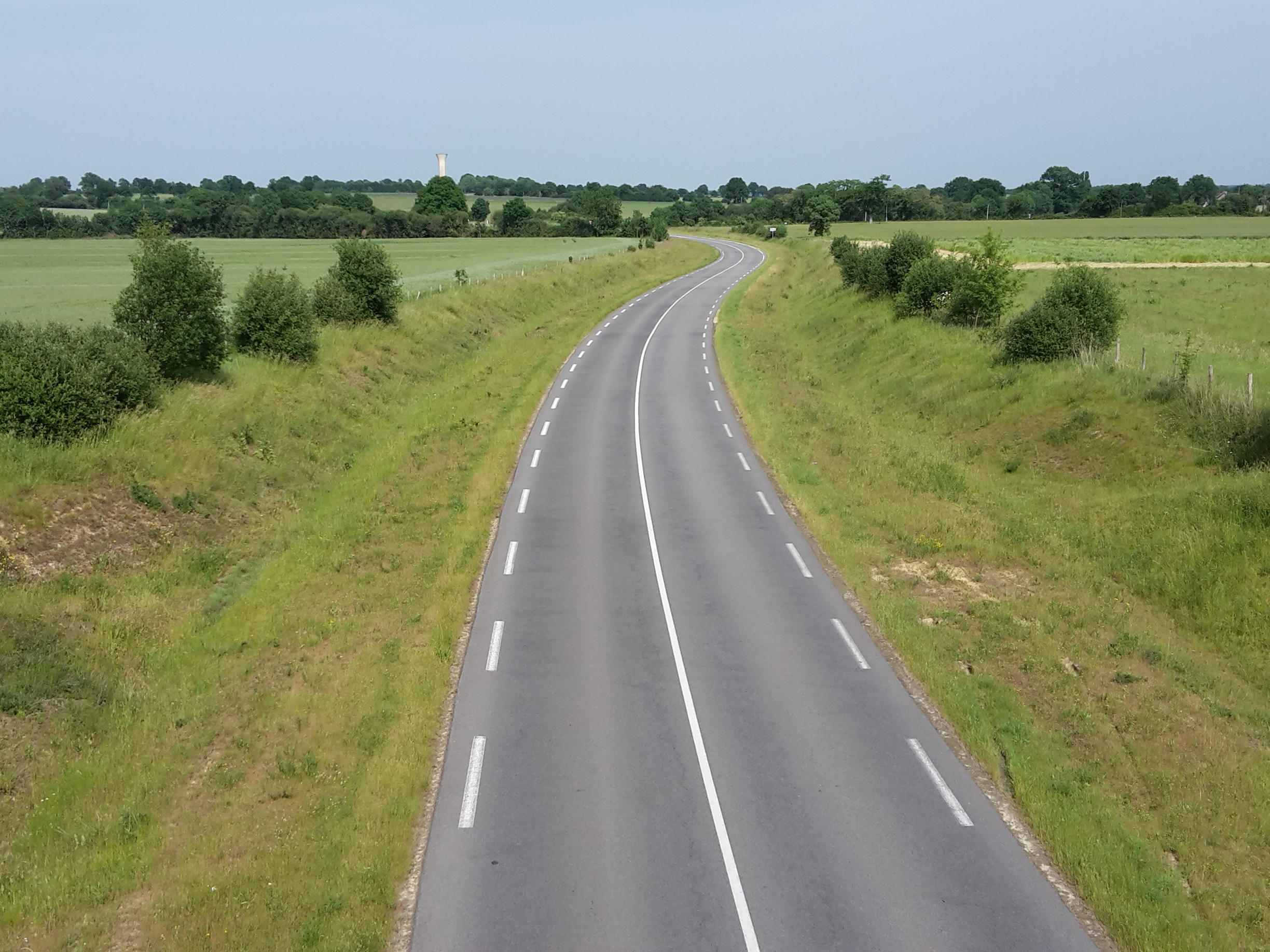 Contournement de Loiré, Maine-et-Loire, France.